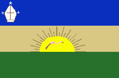 Bandera del municipio Monseñor Iturriza. Estado Falcón. Venezuela